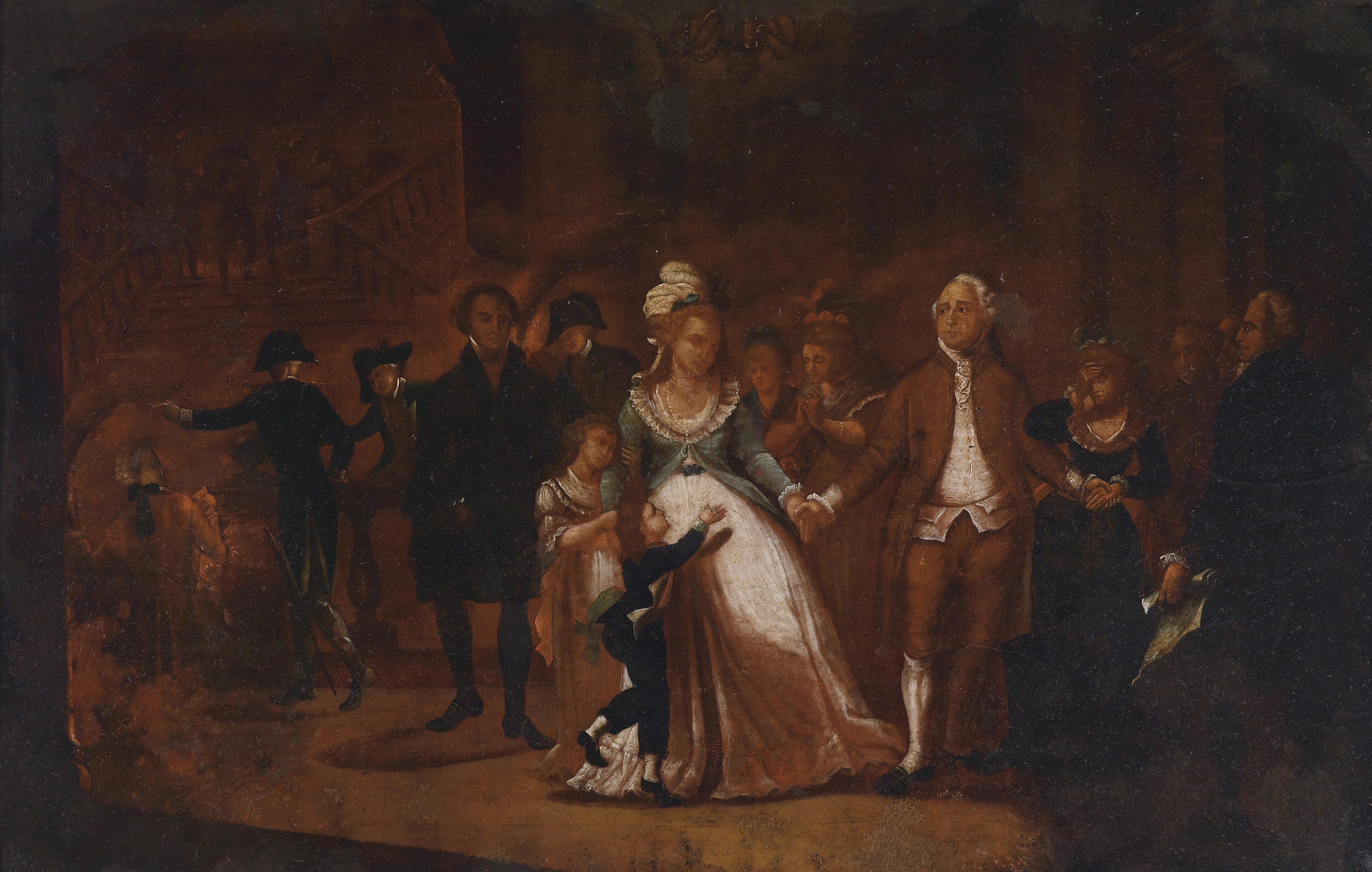 Abschied König Louis XVI. von seiner Familie im Temple